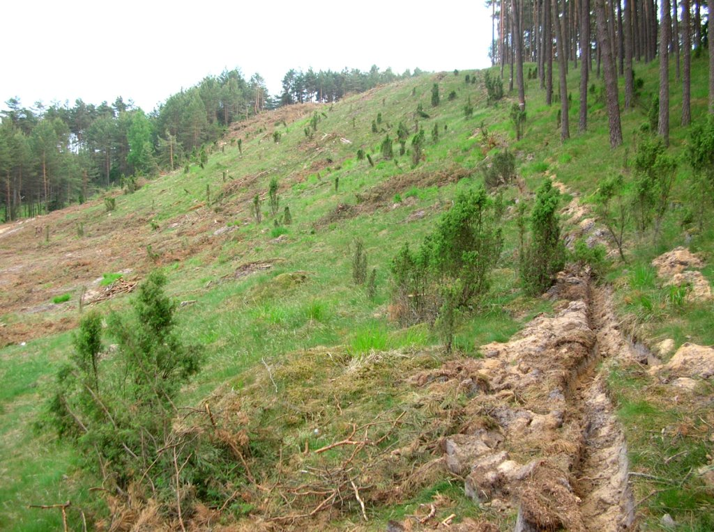 Puszcza Bydgoska